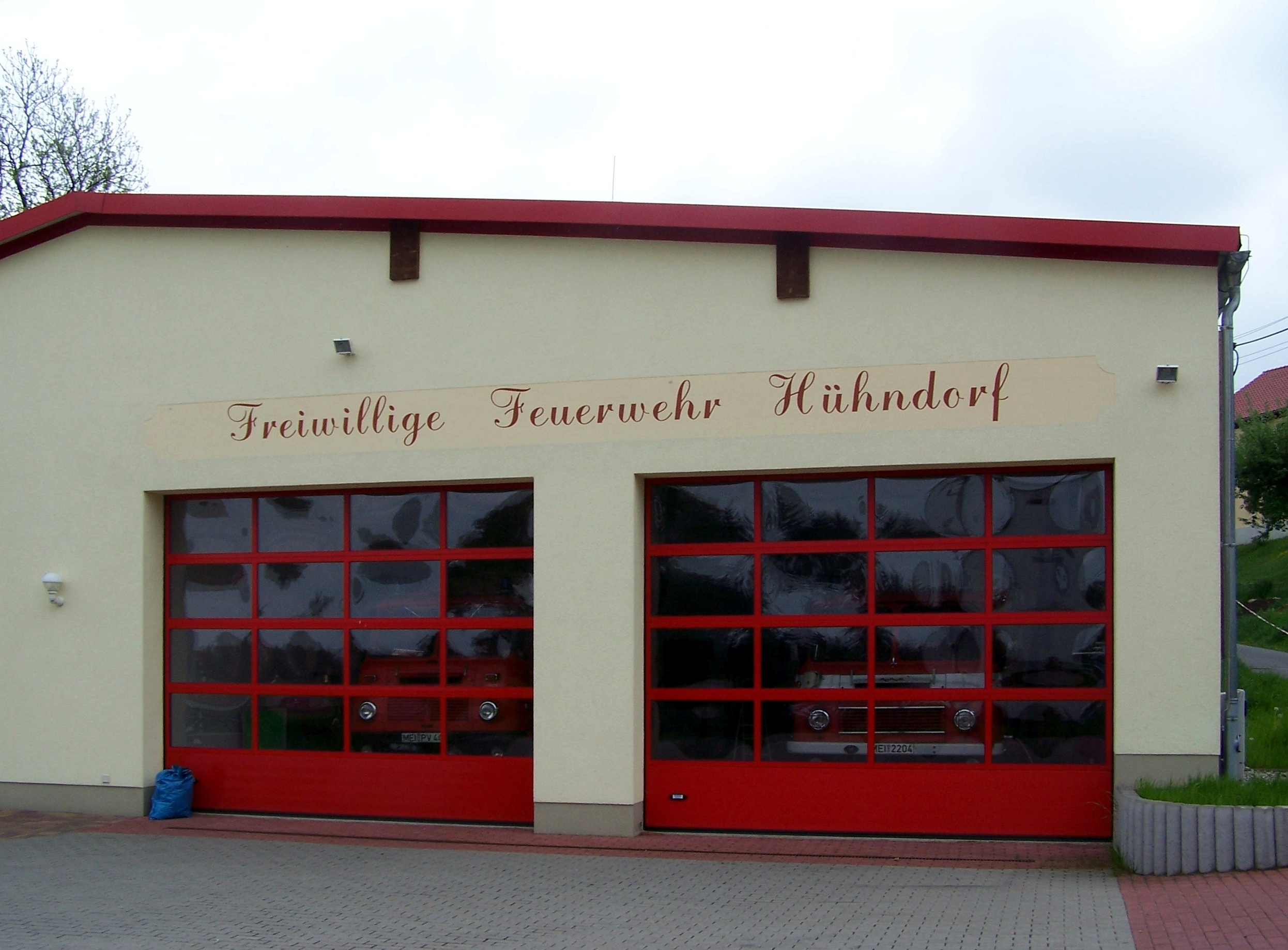 Freiwillige Feuerwehr Hühndorf, Gemeinde Klipphausen, Landkreis Meißen